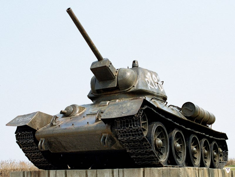 T-34/76 Mod.43 Pomnik w Gdansk na Westerplatte od 1962 roku. Czołg w 2007 r. został przeniesiony do Lubuskiego Muzeum Wojskowego w Drzonowie.